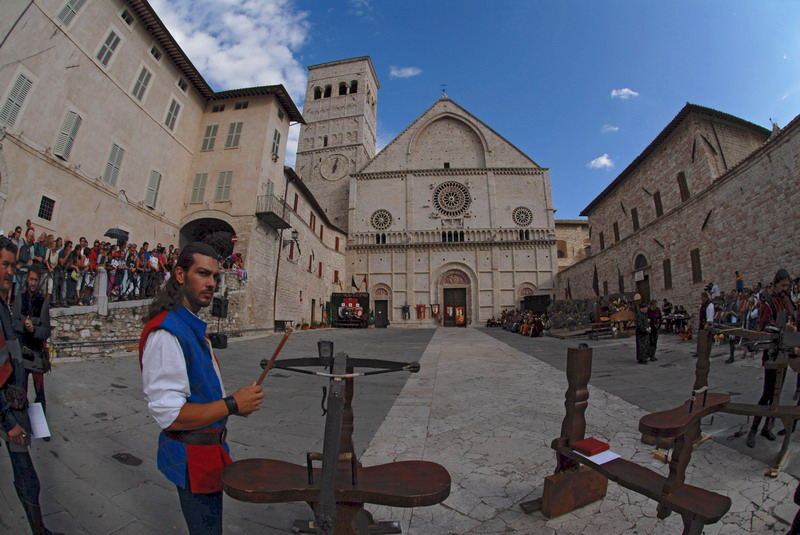 Compagnia Balestrieri di Assisi, Gara a Squadre.